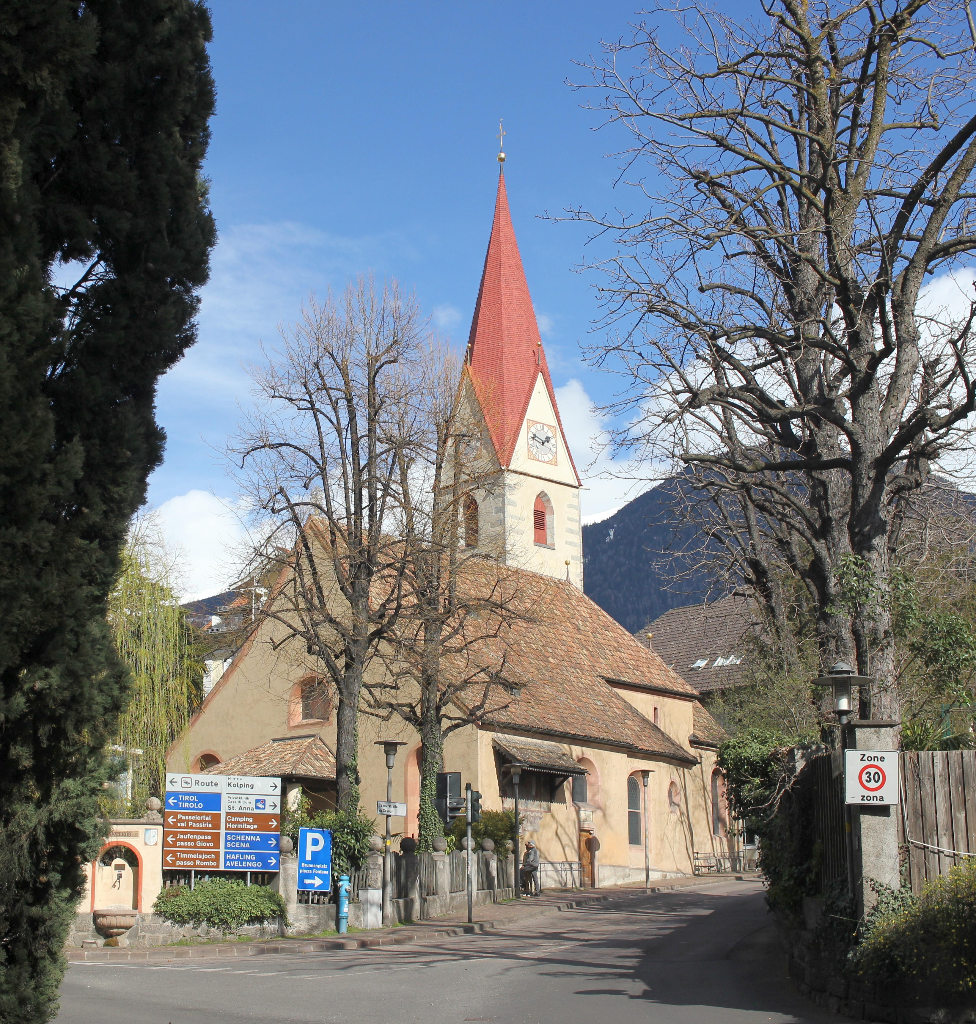 Pfarrkirche St. Georg in Obermais